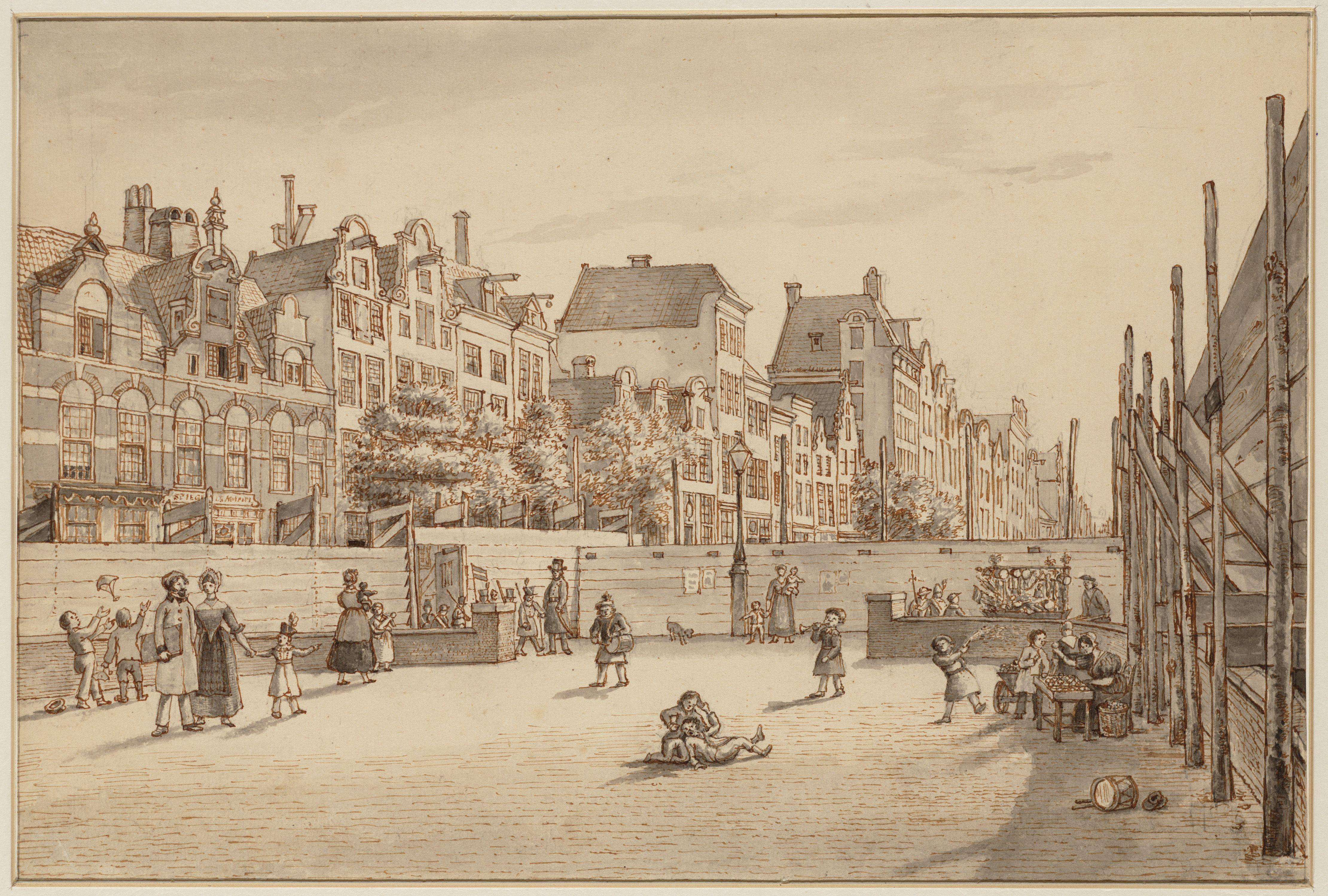 Beurspleintje en Rokin, Amsterdam. drawing. Amsterdam, Stadsarchief Amsterdam, collectie tekeningen en prenten.